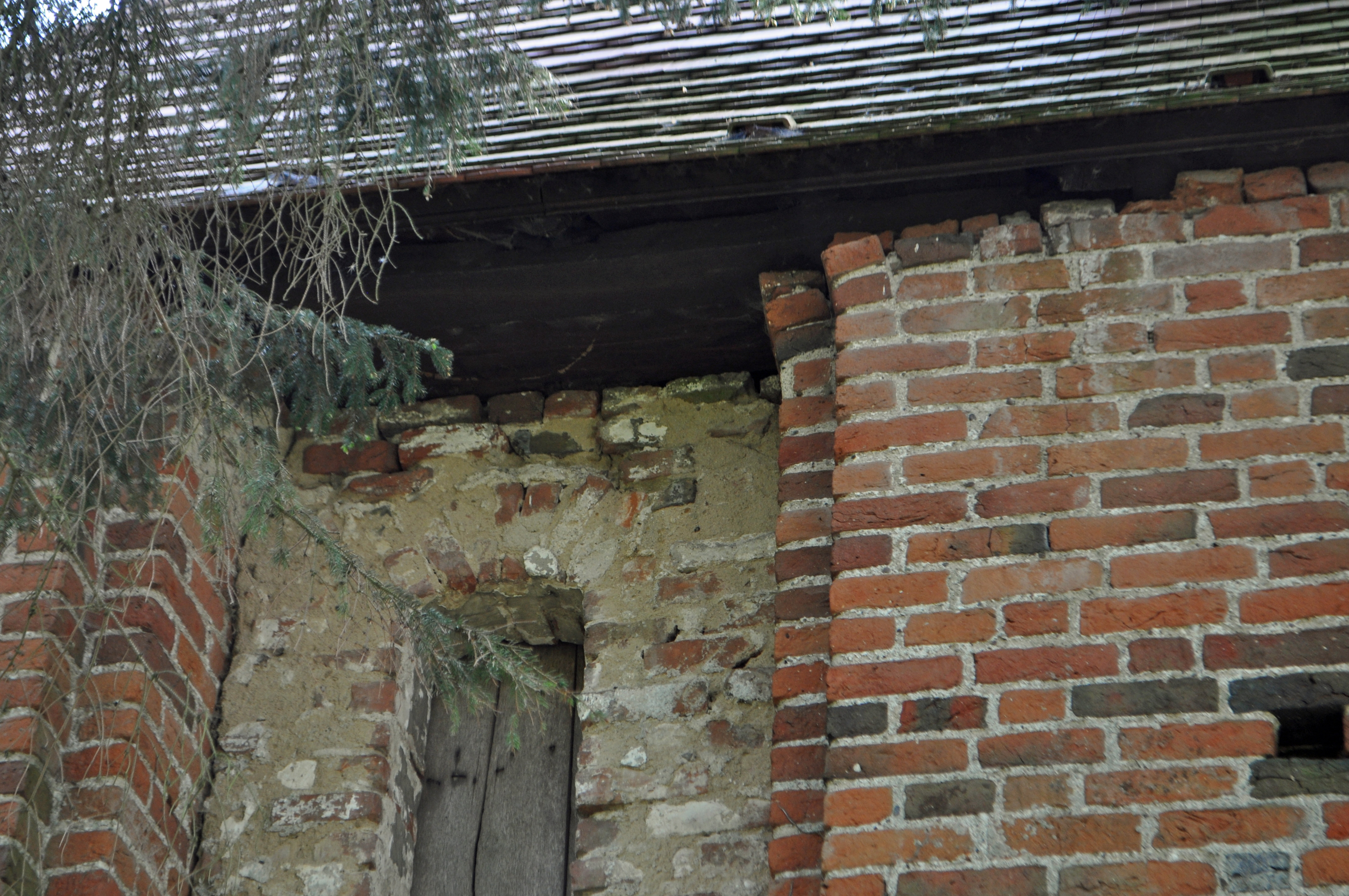 siehe Dateiname! Spitzbogen des ehemaligen Fensters im Turm